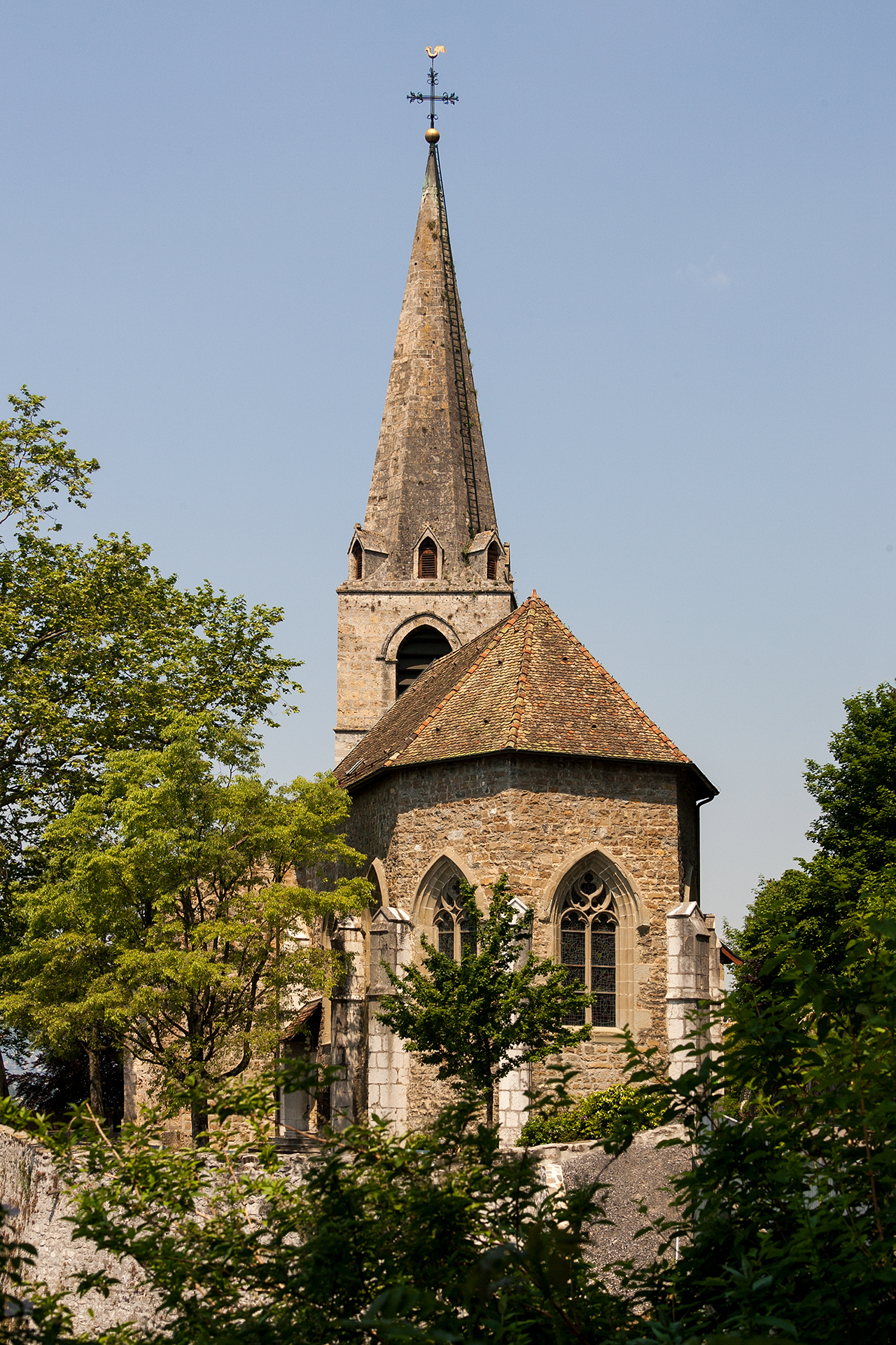 Stadtkirche Saint Vincent in Montreux (VD)